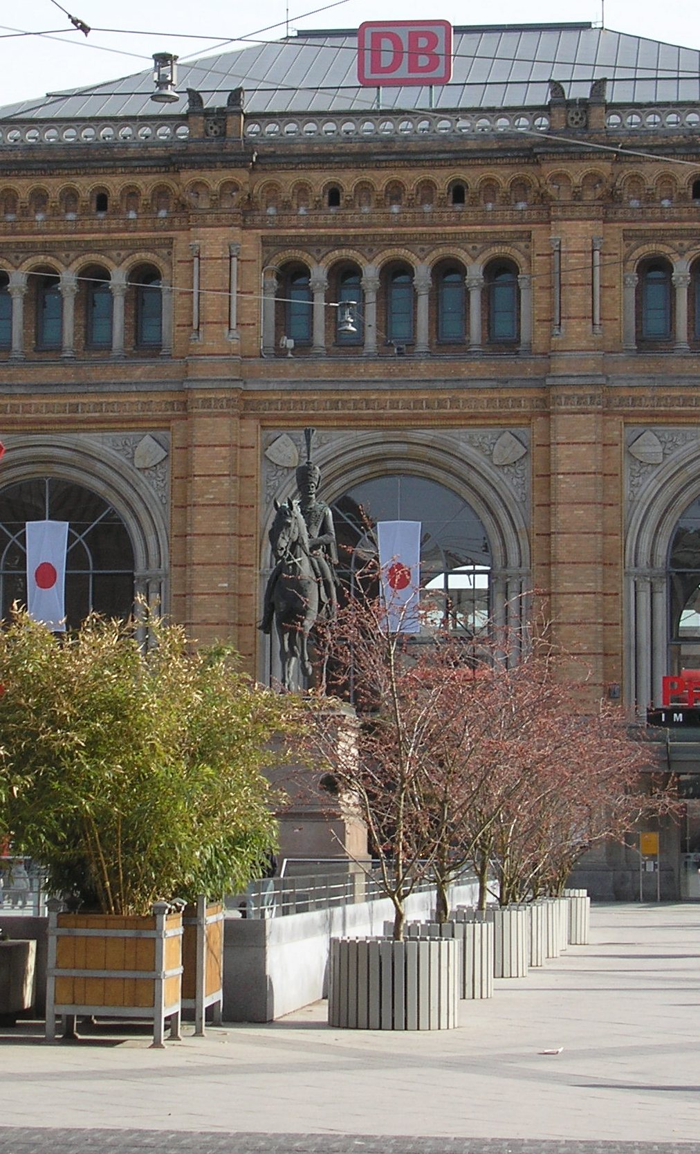 Enrst August Statue at Hannover Hauptbahnhof